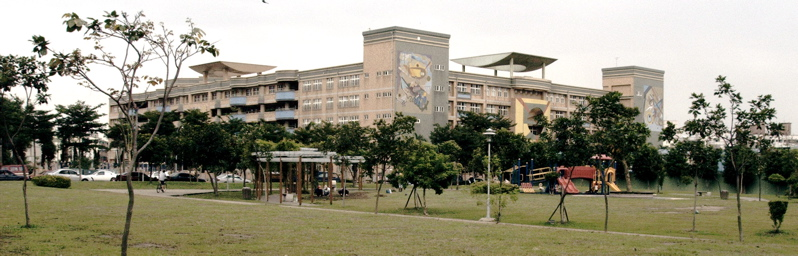 桃園縣中壢市內壢元生國小。